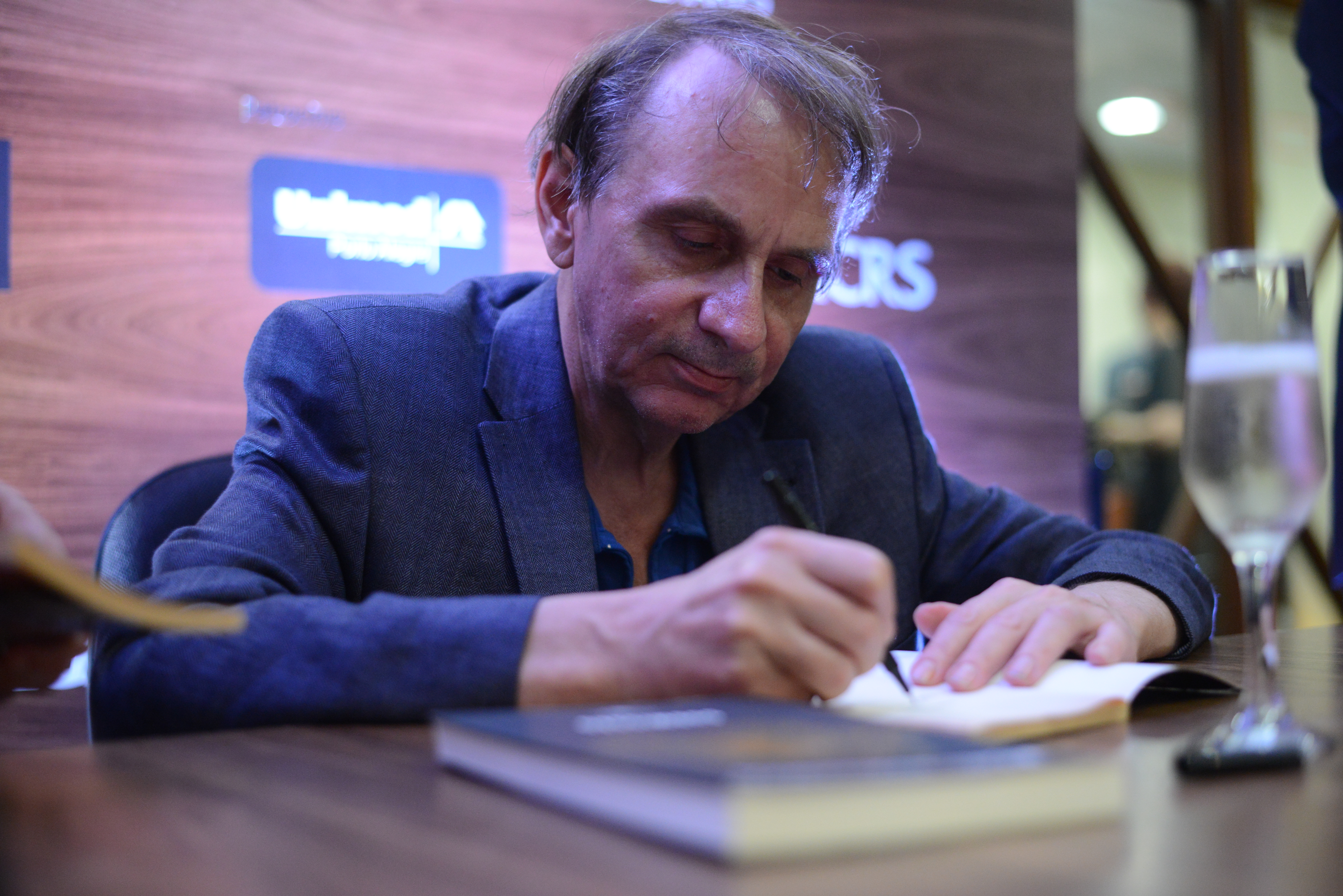 Convidado: Michel Houellebecq, escritor francês Data: 07 de novembro de 2016 Local: Salão de Atos da UFRGS Crédito das imagens: Fronteiras do Pensamento | Luiz Munhoz